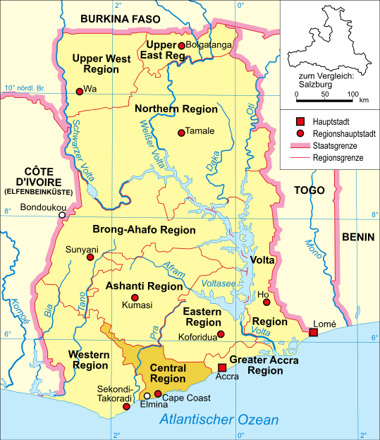 Politische Karte Ghanas (Central Region mit der Stadt Elmina hervorgehoben)